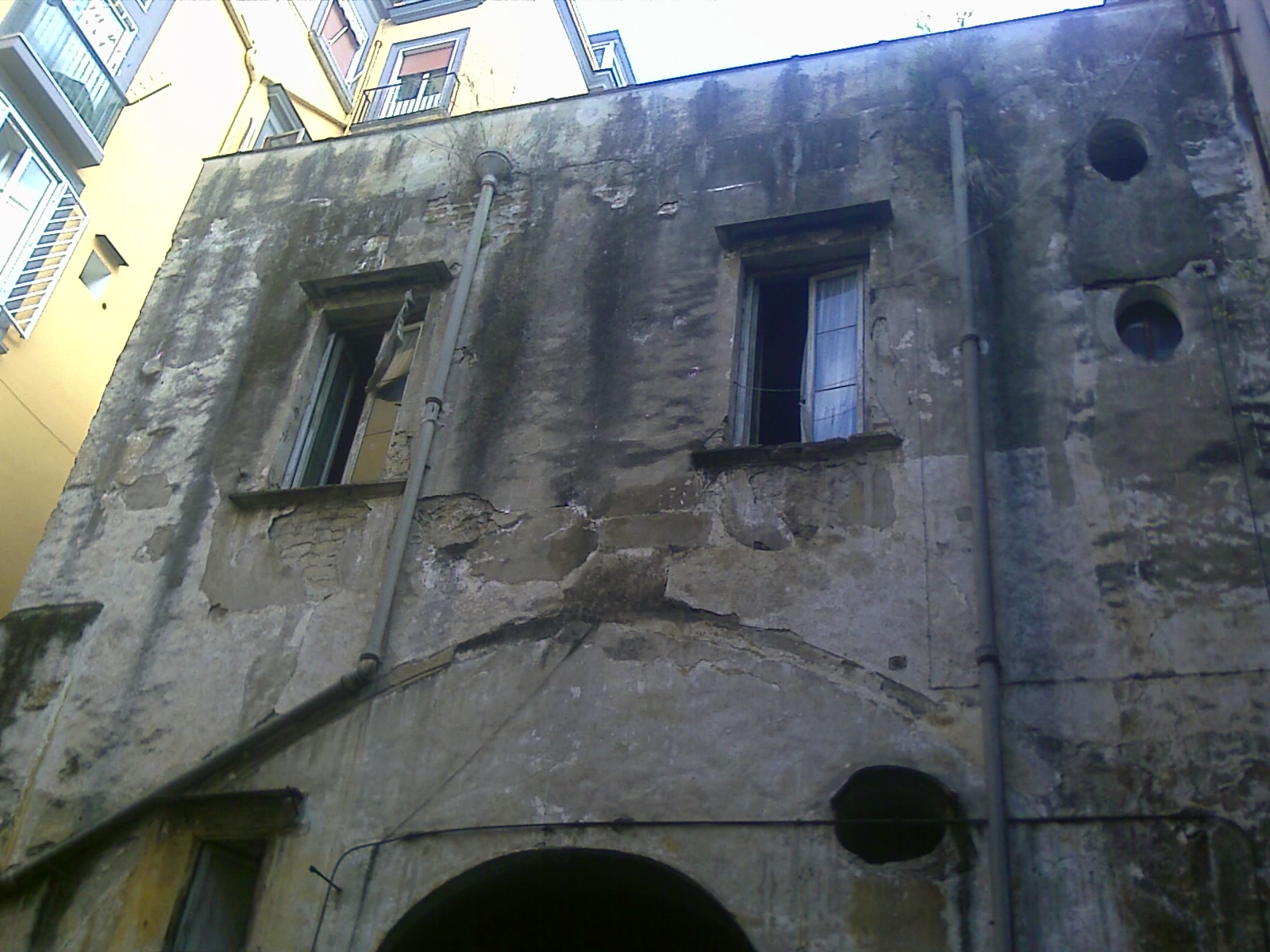 Palazzo Penne:Court